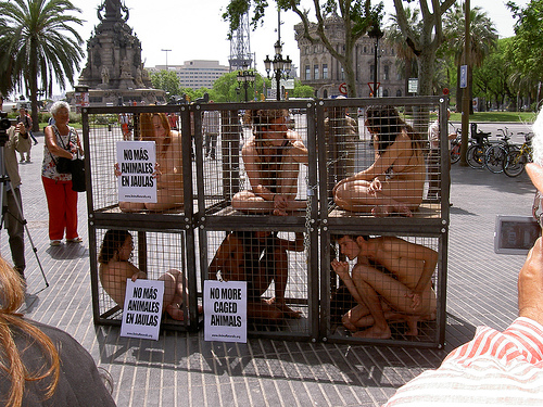 protesta proanimaljaulas